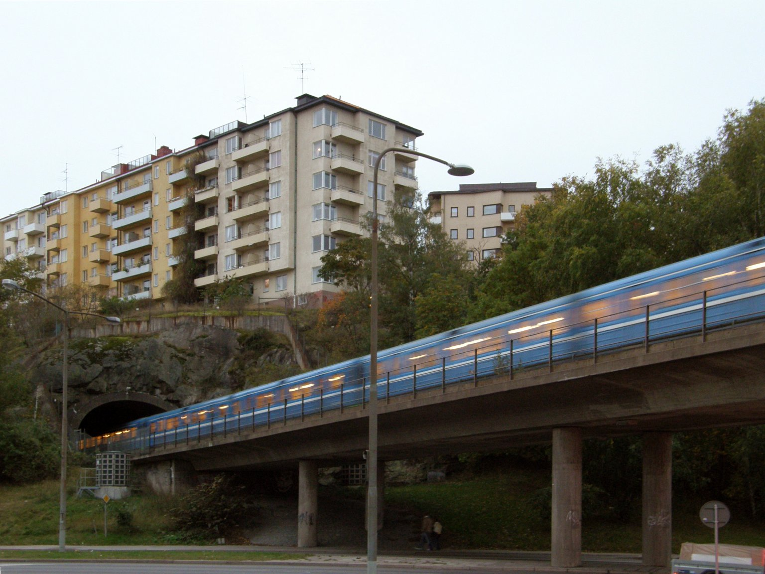 Stockholm metro between Gärdet and Ropsten stations. Taken near the intersection Lidingövägen - Tegeluddsvägen.